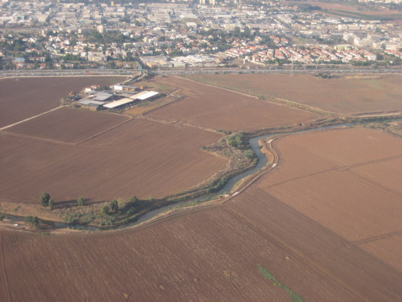 taken by he:משתמש:אסף.